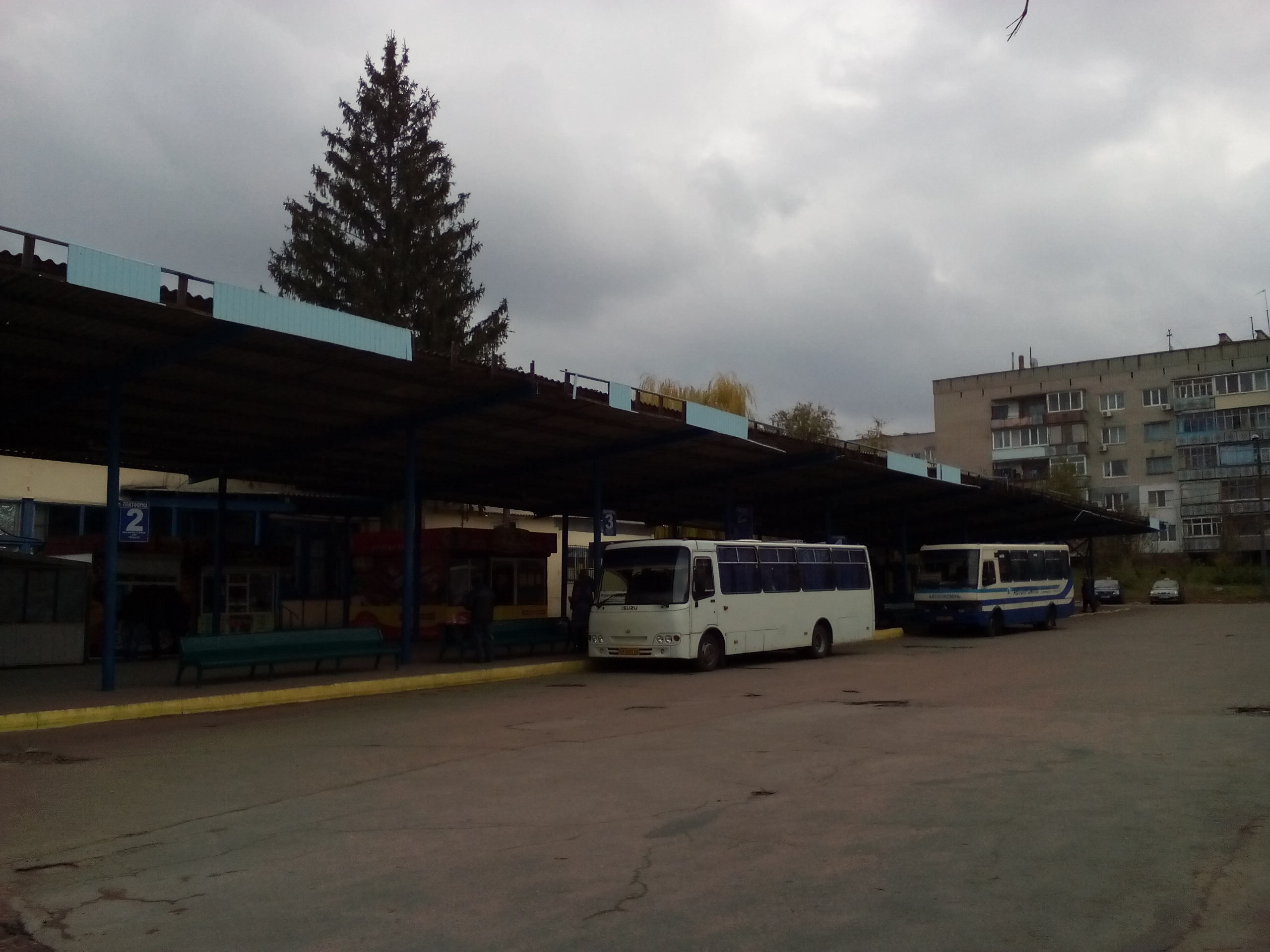 Автостанція у місті Верхньодніпровськ Дніпропетровської області